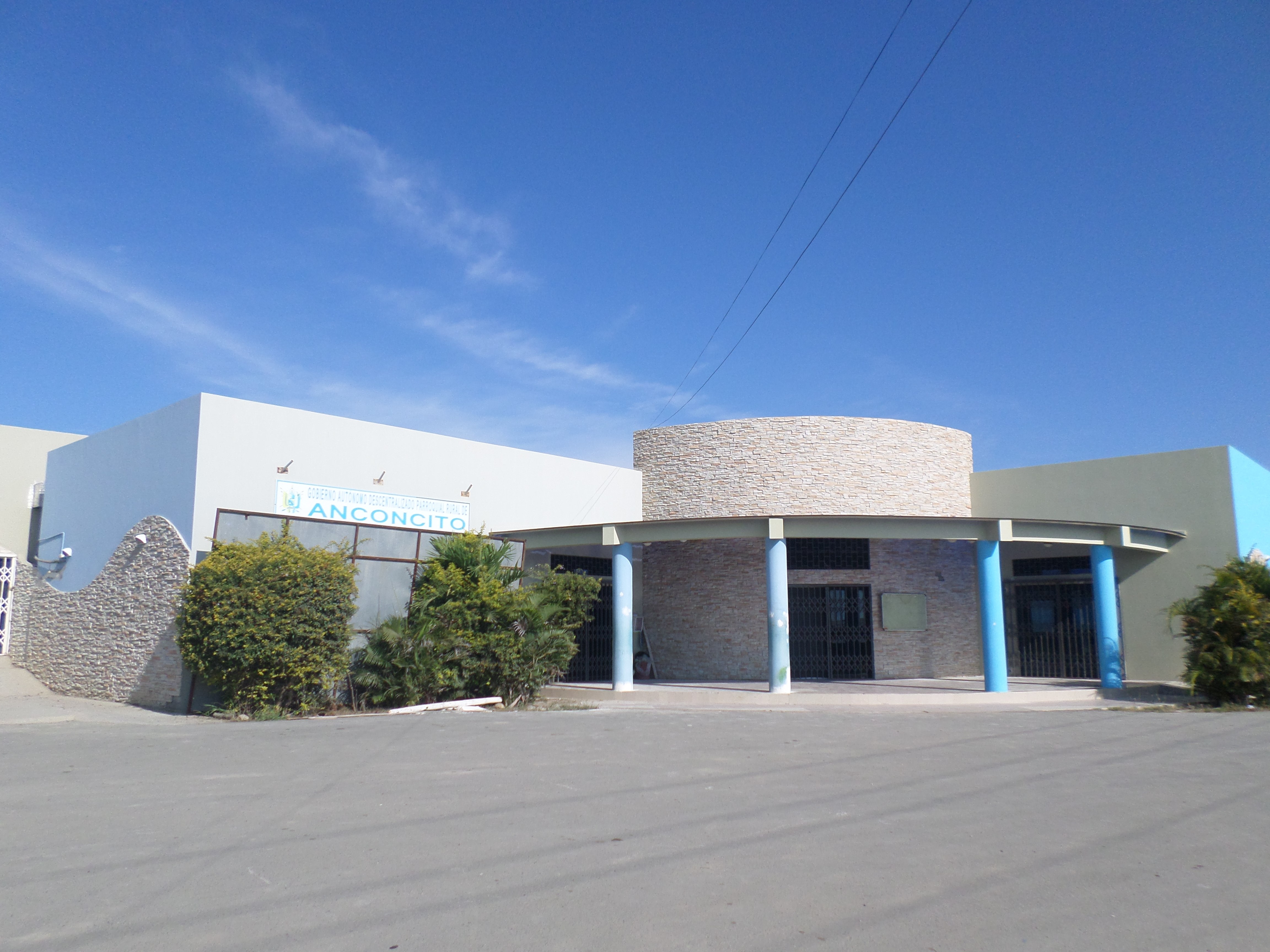 Edificio del GAD Parroquial